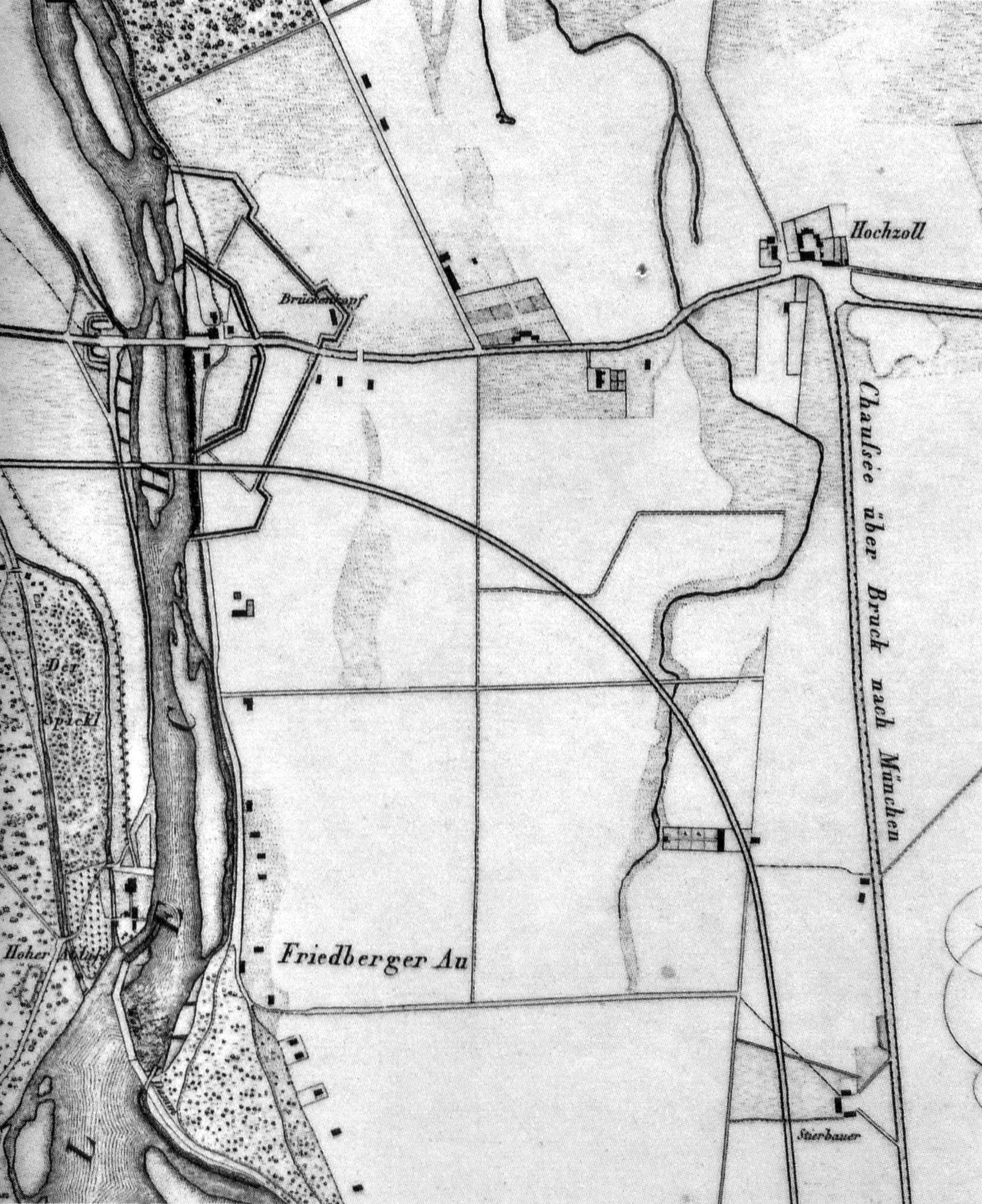 Die Lechbrücke bei Augsburg mit Schanzen und dem Brückenkopf, Hochzoll, der "Chaussee über Bruck nach München" und der Friedberger Au in einer Karte von 1839. Die Bahnlinie nach München ist in der Karte bereits eingezeichnet. Am linken Bildrand sichtbar ist auch der "Hohe Ablaß" (heute: Hochablass)